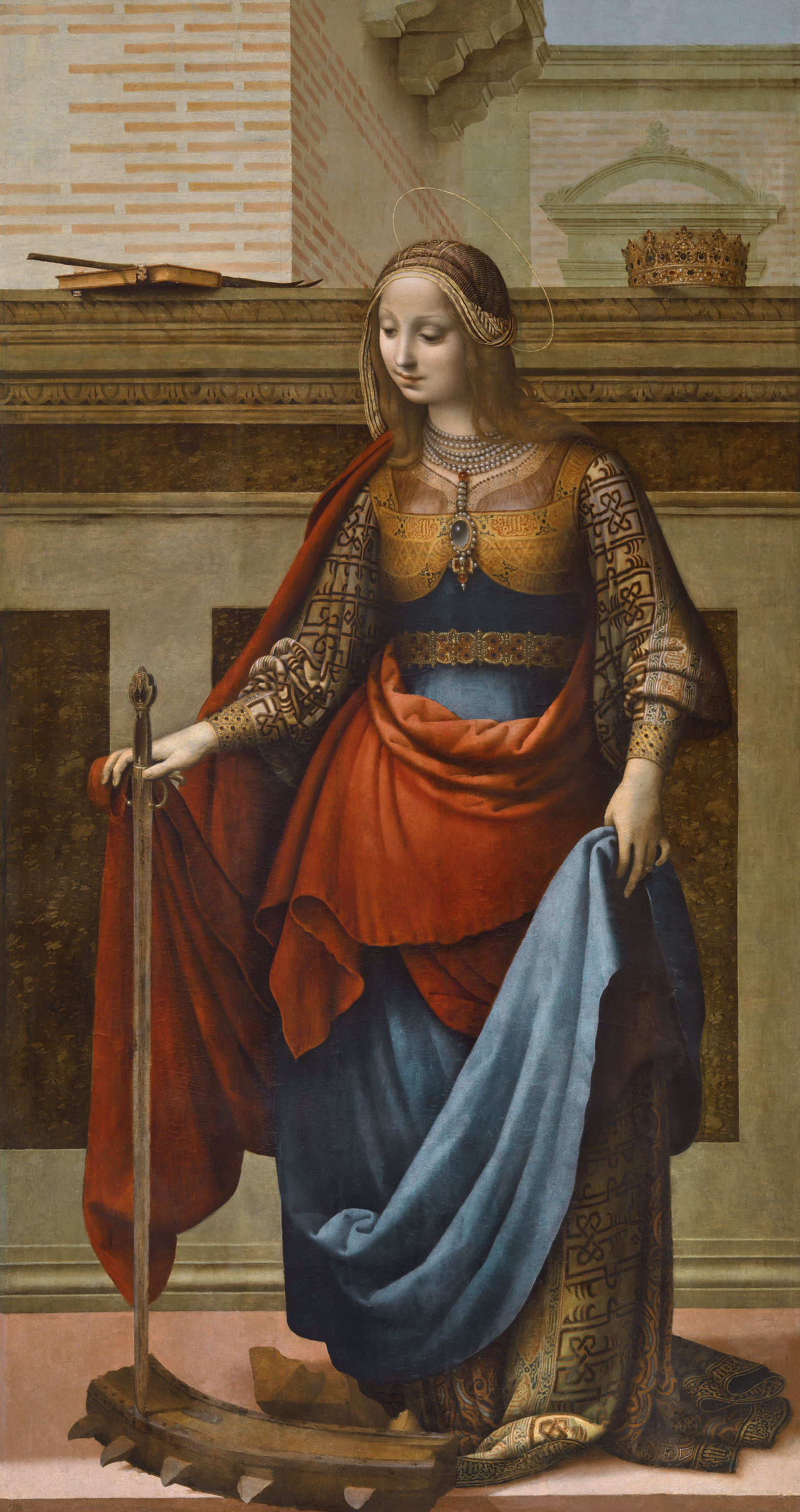 La obra representa a Santa Catalina de Alejandría, que fue martirizada por profesar el cristianismo.